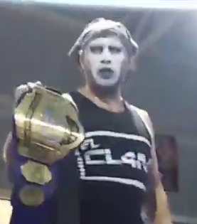 Charly Manson avec le titre par équipe de la GCW